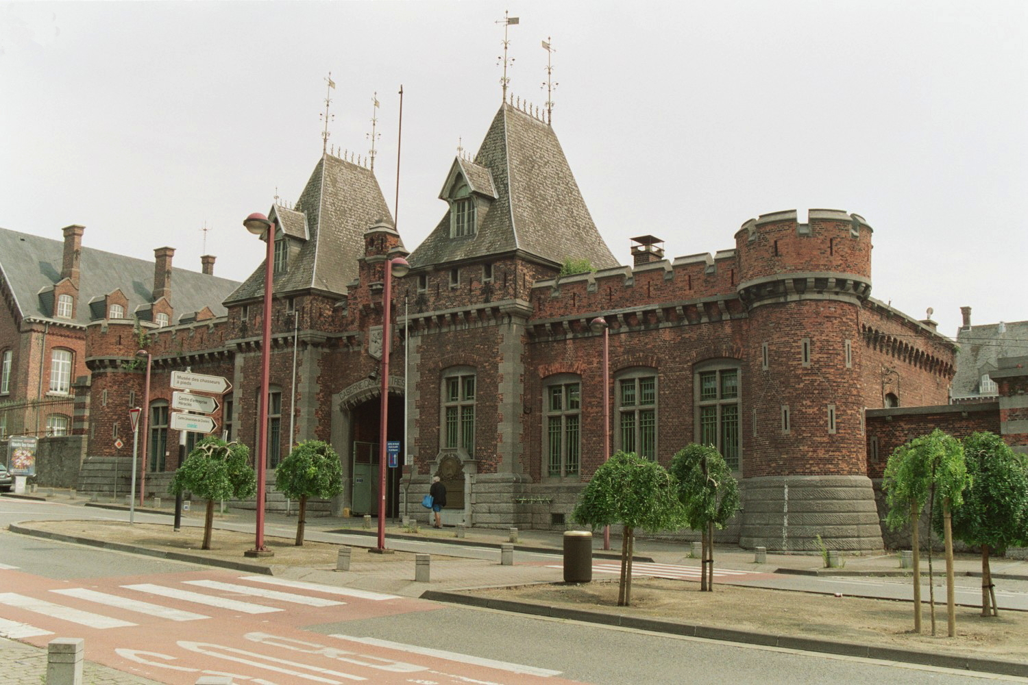 Charleroi, avenue Général Michel : Caserne Caporal Trésignies (1887). Ancienne caserne d'infanterie, bâtie sur des terrains autrefois occupés par les fortifications, est un exemple d'architecture néogothique.